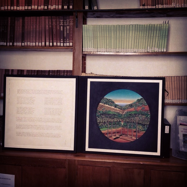 Page manuscrite et Peinture présente dans les collections de la Bibliothèque patrimoniale de la Ville de Nice.